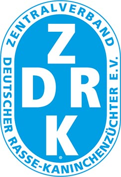 Logo des Zentralverbandes Deutscher Rassekaninchenzüchter. Ist auf allen offiziellen Dokumenten abgelichtet und darf nur ausschließlich dafür genommen werden